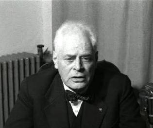 Pieter Oud in 1959